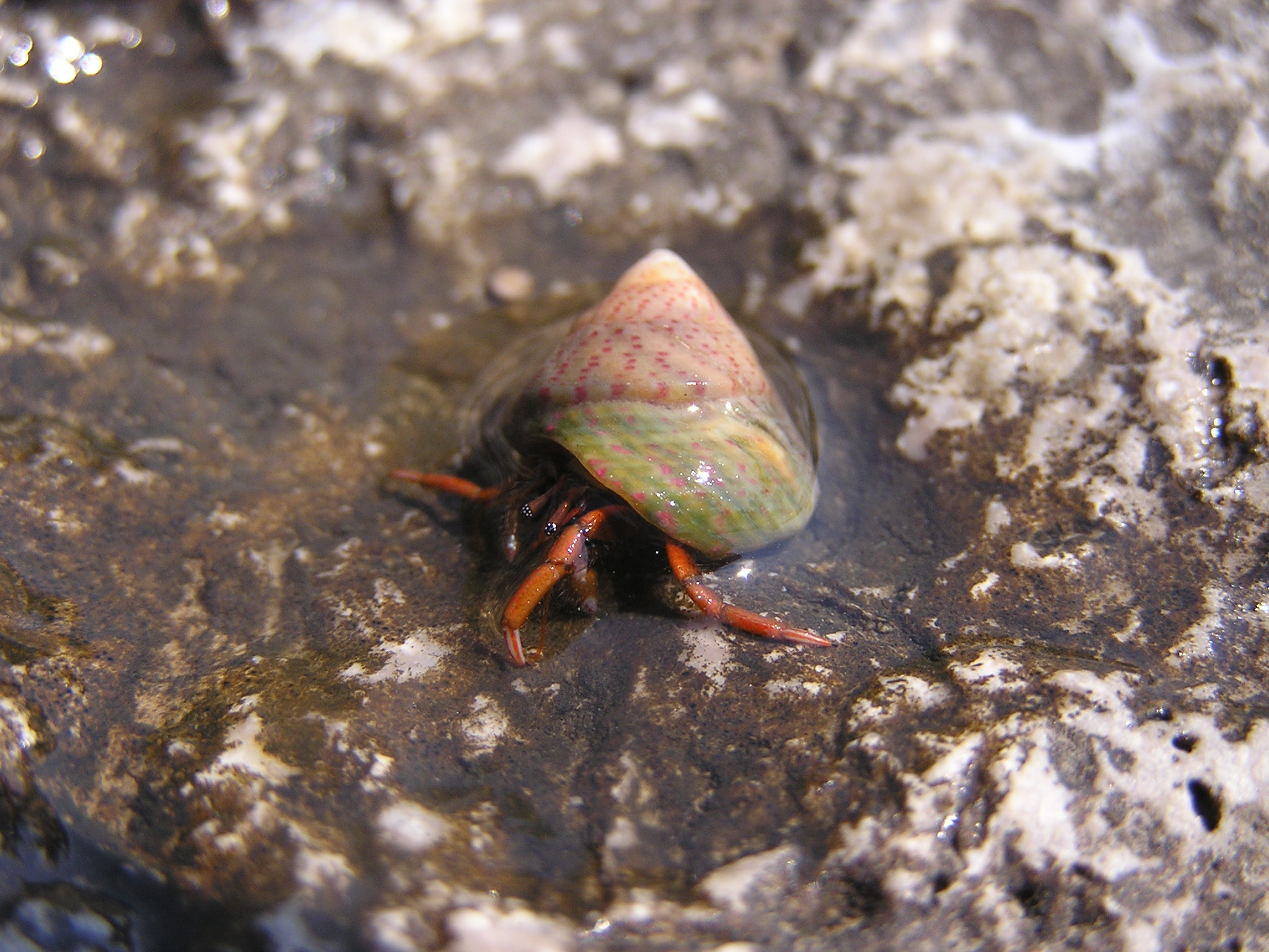 Clibanarius erythropus (Latreille, 1818)